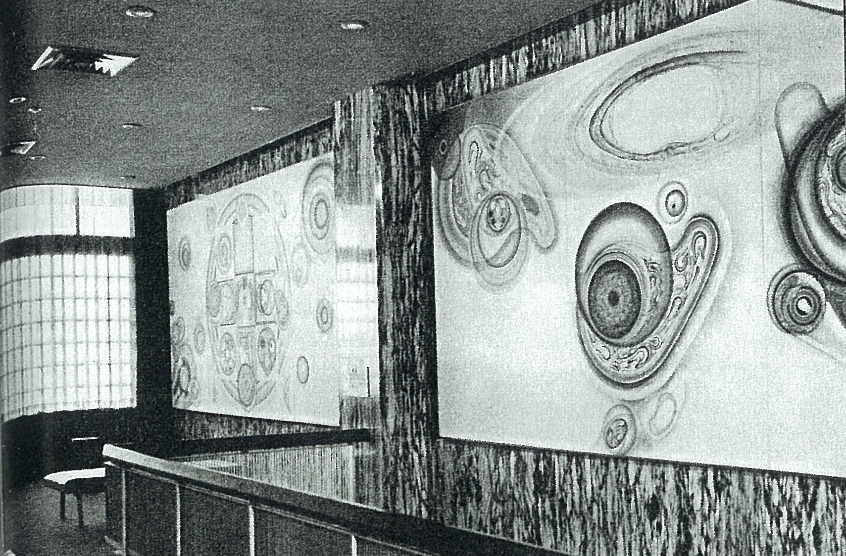 新潟県長岡市に1964年から1979年まで存在した長岡現代美術館の2階ロビーにある前田常作による壁画